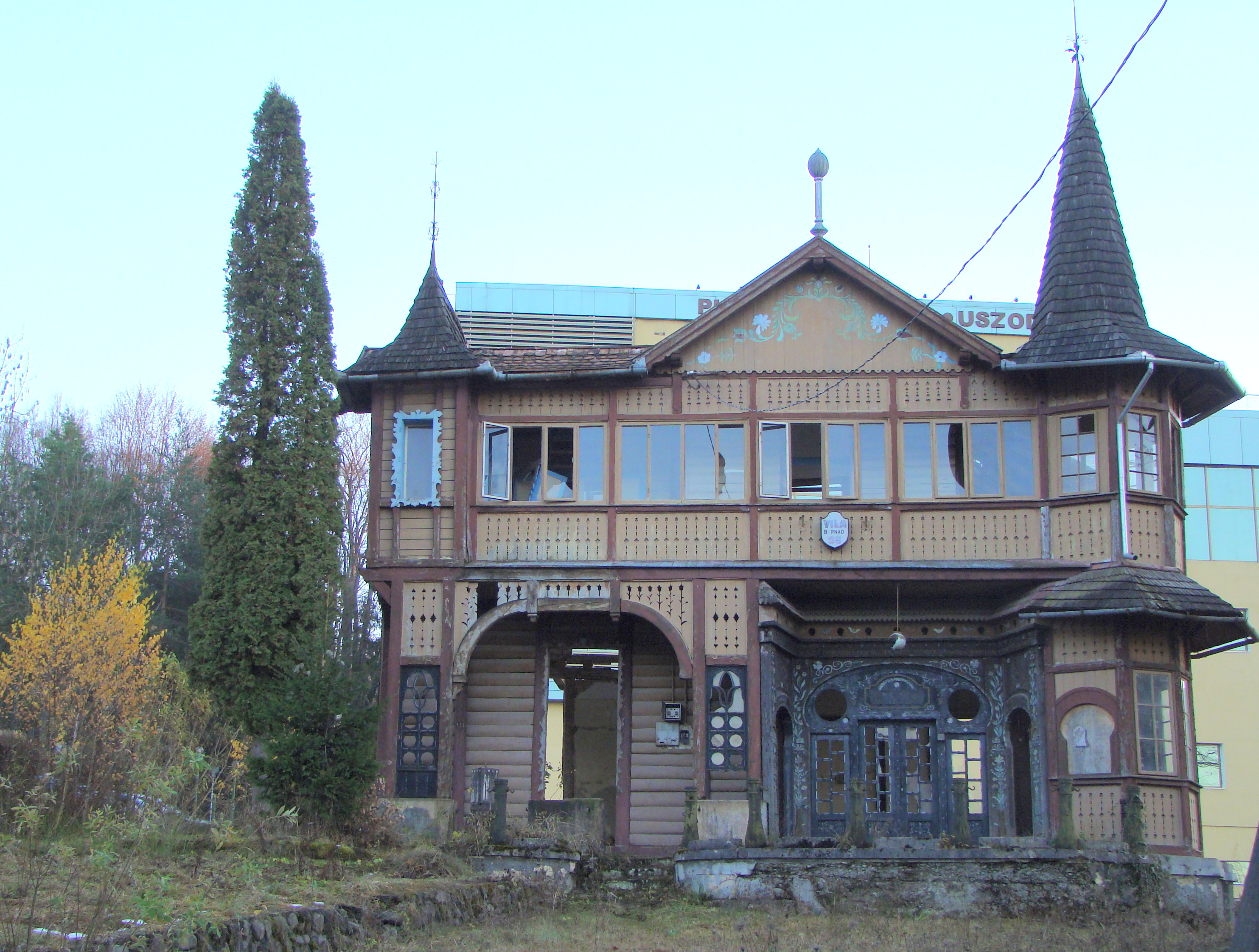 Casa Bernady oraș Sovata Str. Trandafirilor 133